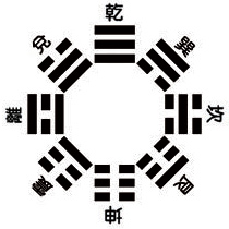 Xiantian-Anordnung ("Vor-Himmel") der Acht Trigramme